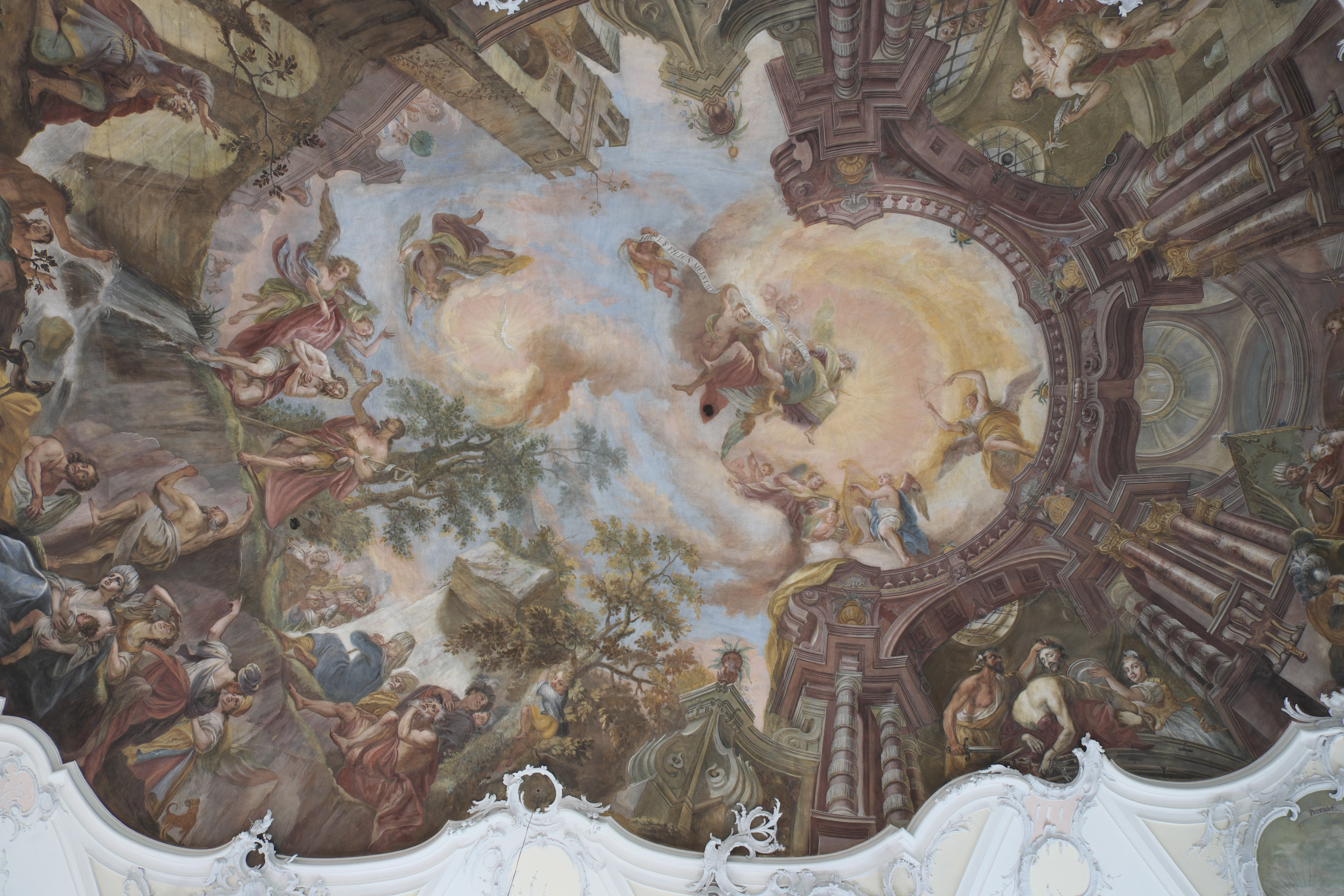 Katholische Pfarrkirche St. Johannes Baptist in Wessobrunn im Landkreis Weilheim-Schongau (Bayern/Deutschland), Stuck von Tassilo Zöpf, Deckenfresko im Langhaus von Johann Baptist Baader (Lechhansl), von 1758/59; Darstellung: Szenen aus dem Leben des Johannes des Täufers